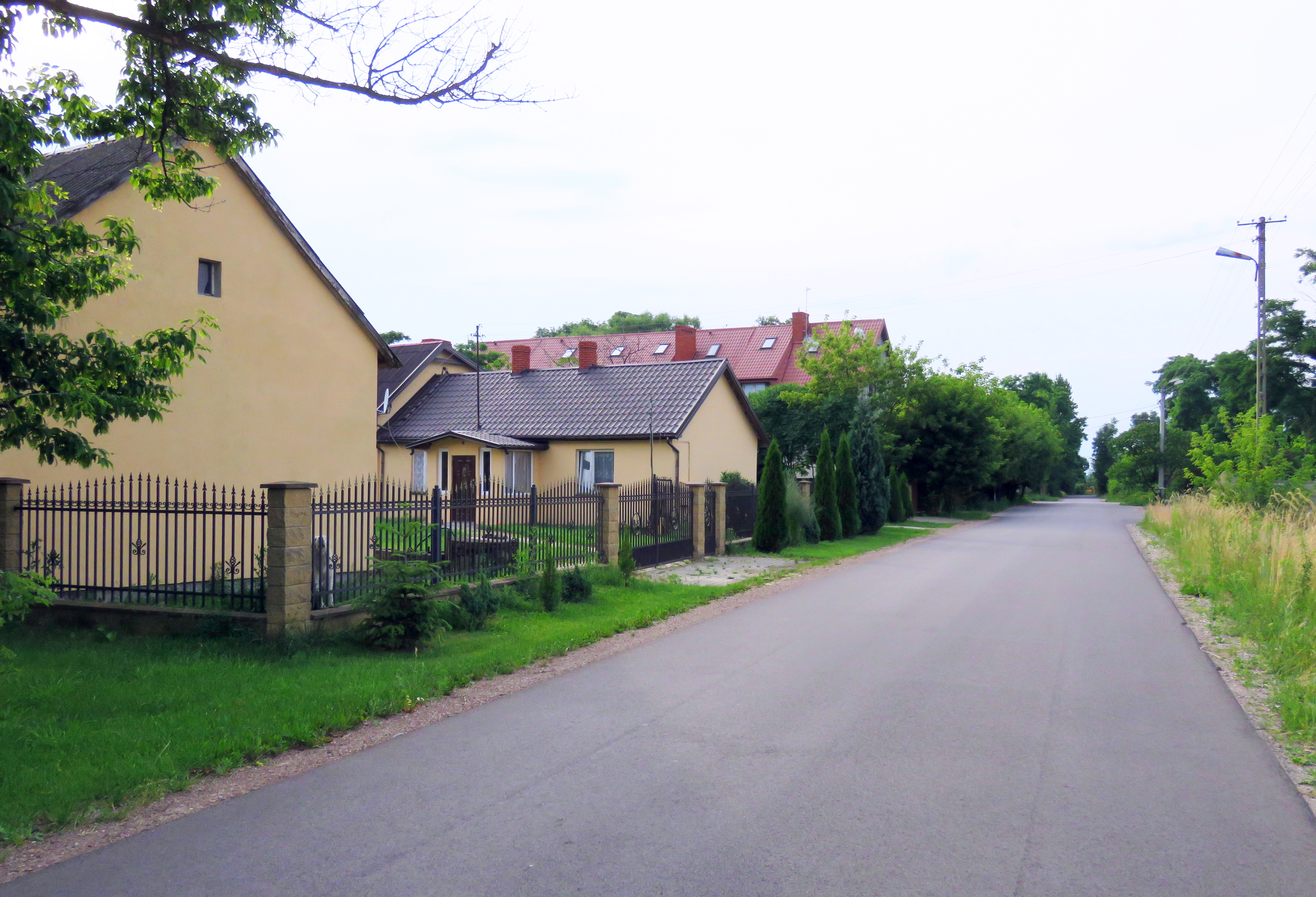 Chyliczki gm.Jaktorów